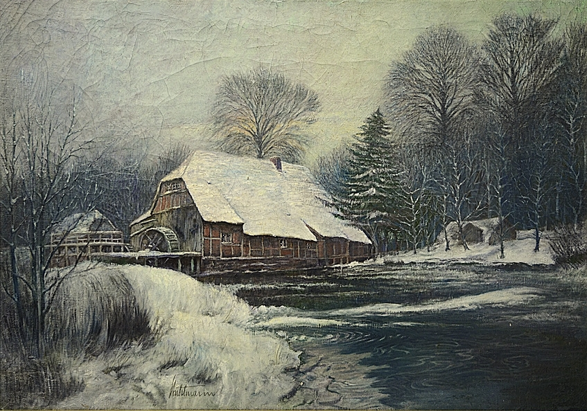 Malerischer Blick auf eine alte Wassermühle mitten im Winter